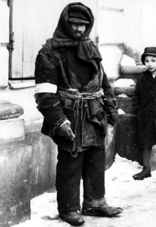 Jüdischer Gepäckträger in Kielce am Bahnhof